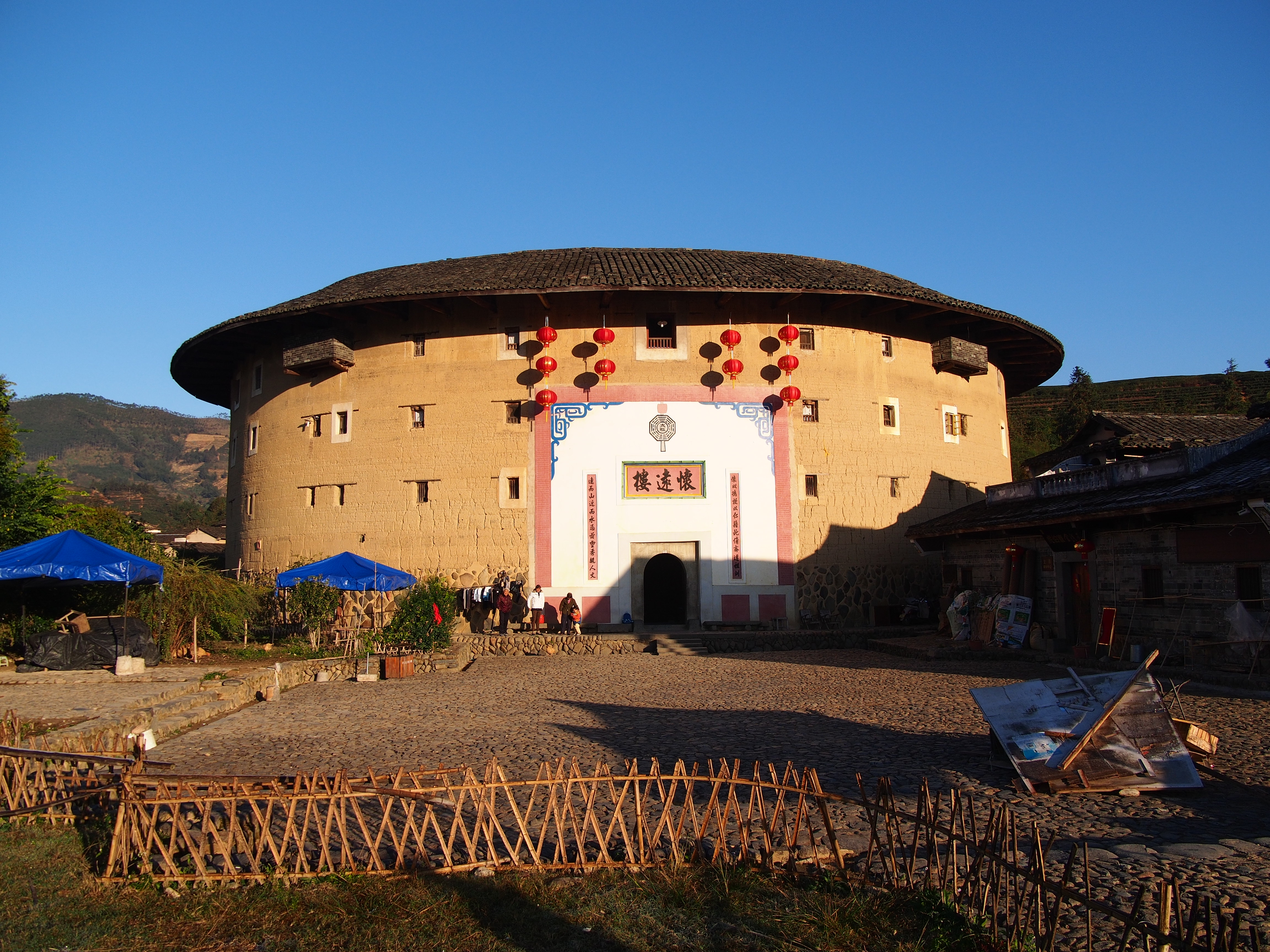 怀远楼 - Huaiyuan Lou - 2013.11